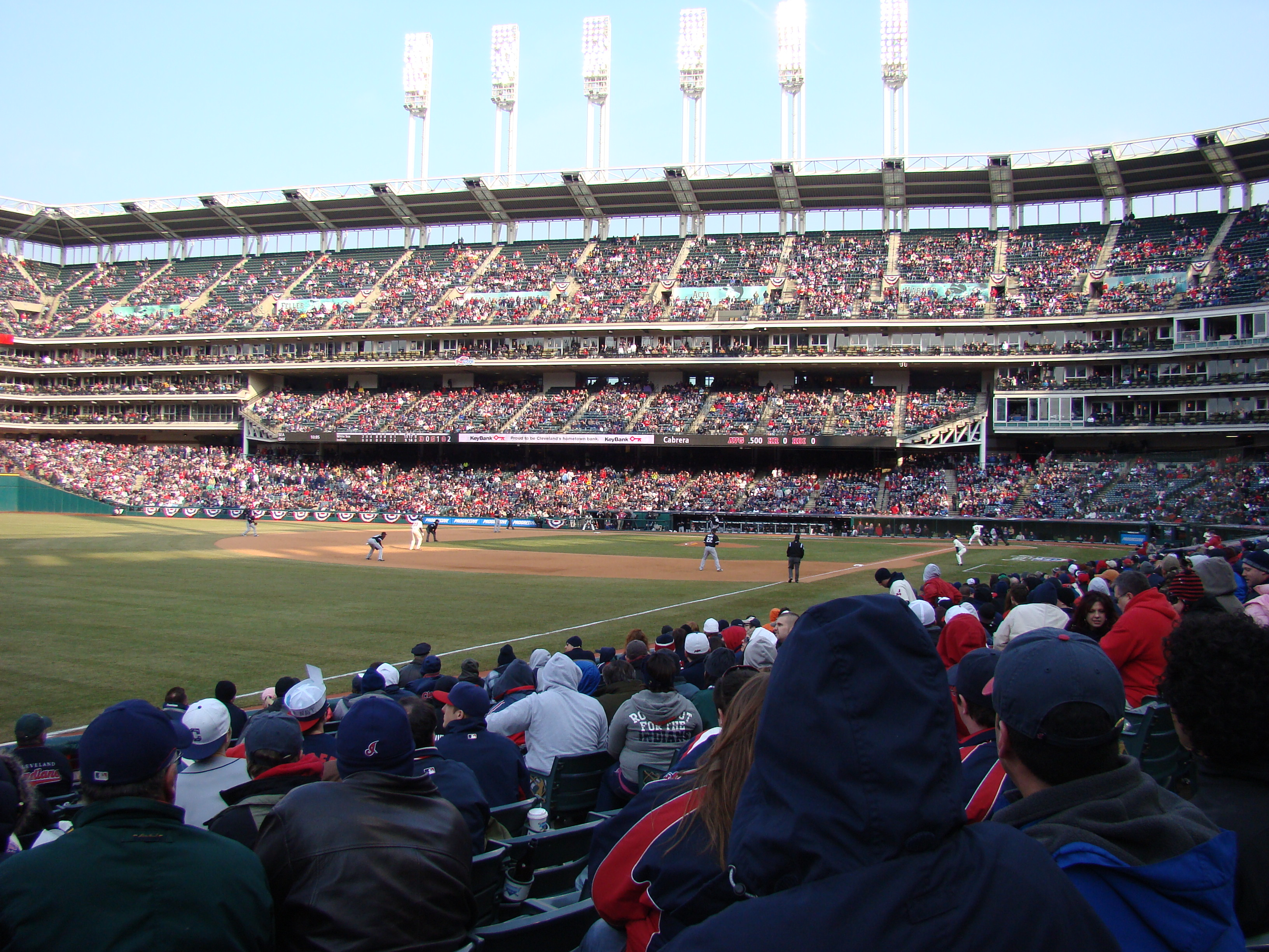 Progressive Field tijdens Opening Day 2011